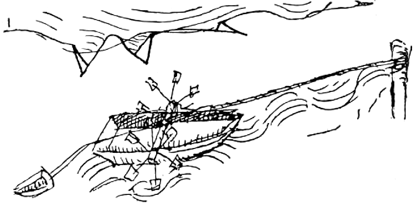 Entwurf zur Seilschifffahrt von Jacopo Mariano (1438) in Cod. latin. 197 der Münchener Staatsbibliotek (Bl. 1)